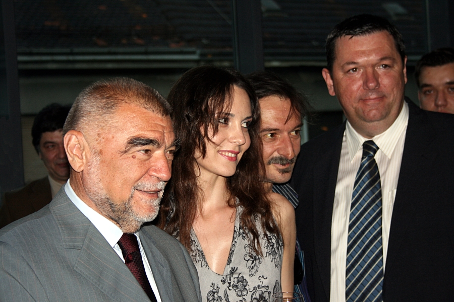 Stjepan Mesić s glumačkom ekipom na premijeri filma Nije kraj u Zagrebu